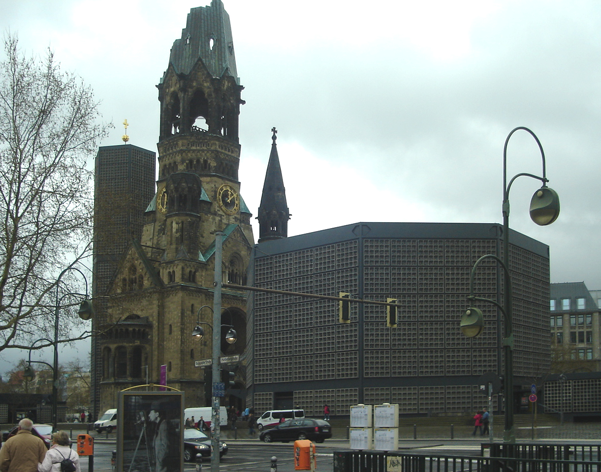 La iglesia evangélica luterana Kaiser-Wilhelm-Gedächtniskirche (iglesia en recuerdo del emperador Wilhelm), coloquialmente conocida como Gedächtniskirche (iglesia del recuerdo), se sitúa en la plaza Breitscheidplatz. Se compone de varios volúmenes, la iglesia antigua bombardeada, y la parte nueva a sus lados. Se declaró monumento protegido. ...más info aquí.